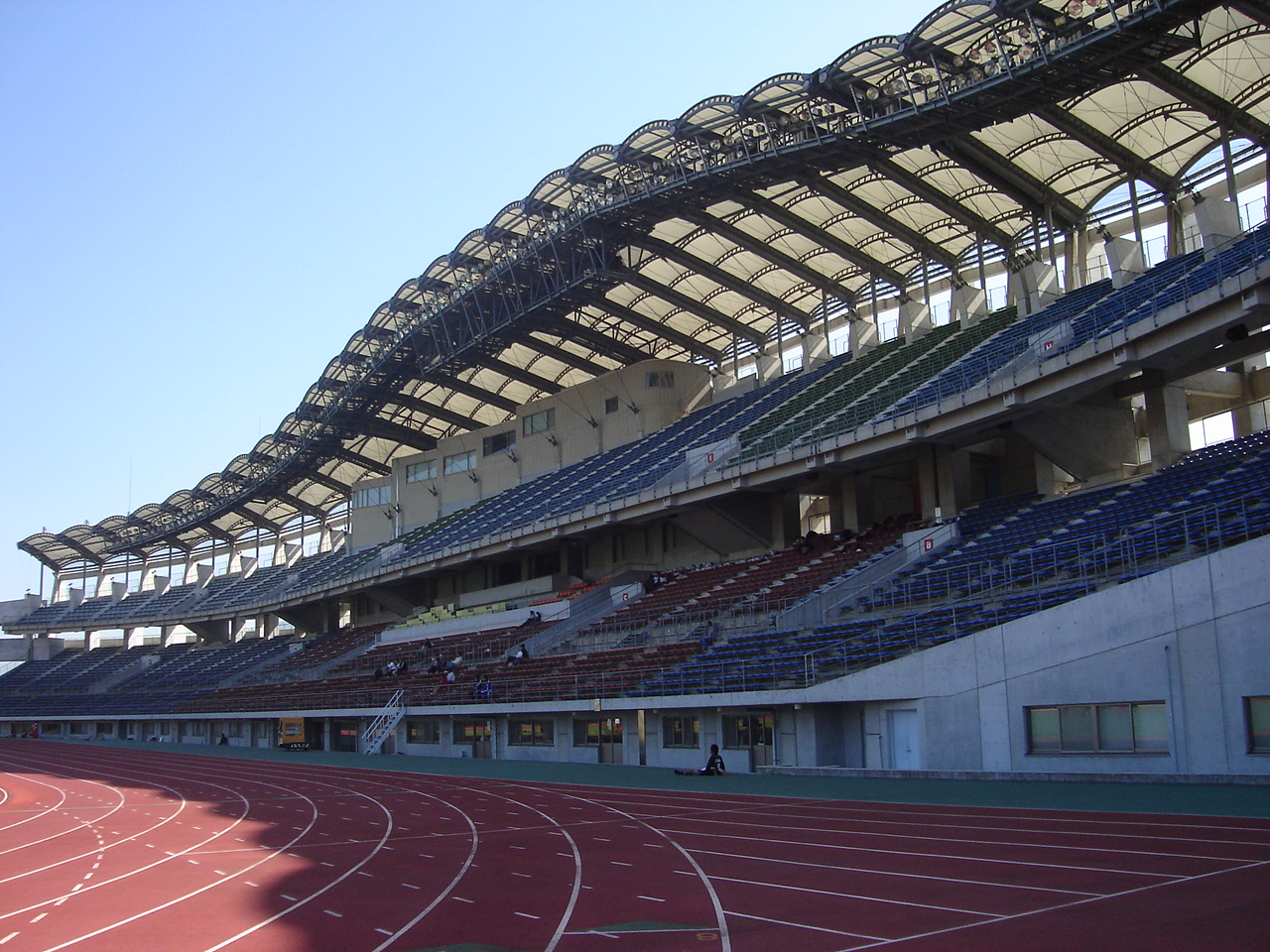 香川県立丸亀競技場。 - 日本国香川県丸亀市にある競技場。